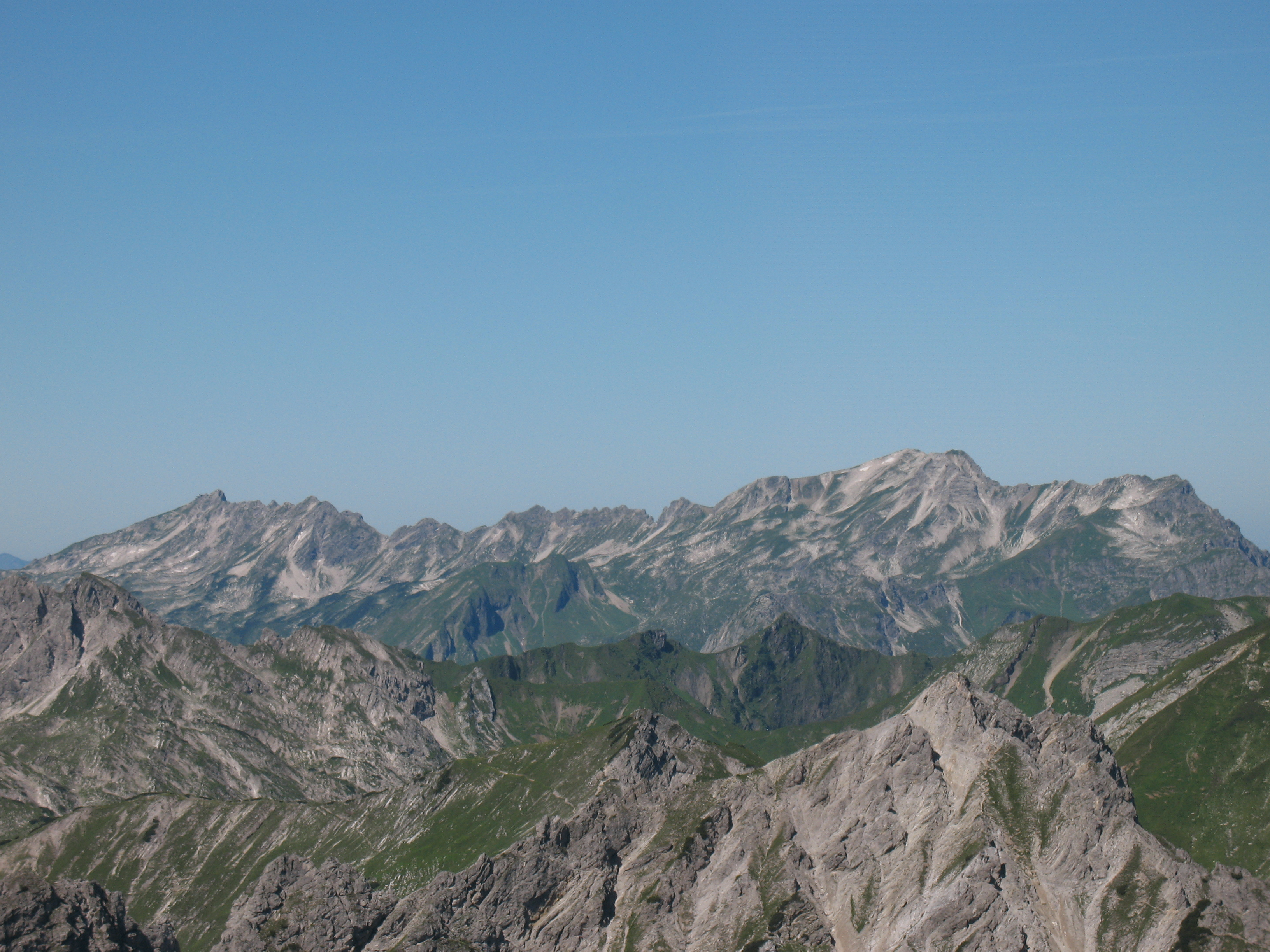 Blick von der Leilachspitze auf den Verlauf des Hindelanger Klettersteigs zwischen den Wengenköpfen und dem Großen Daumen (2280 m).